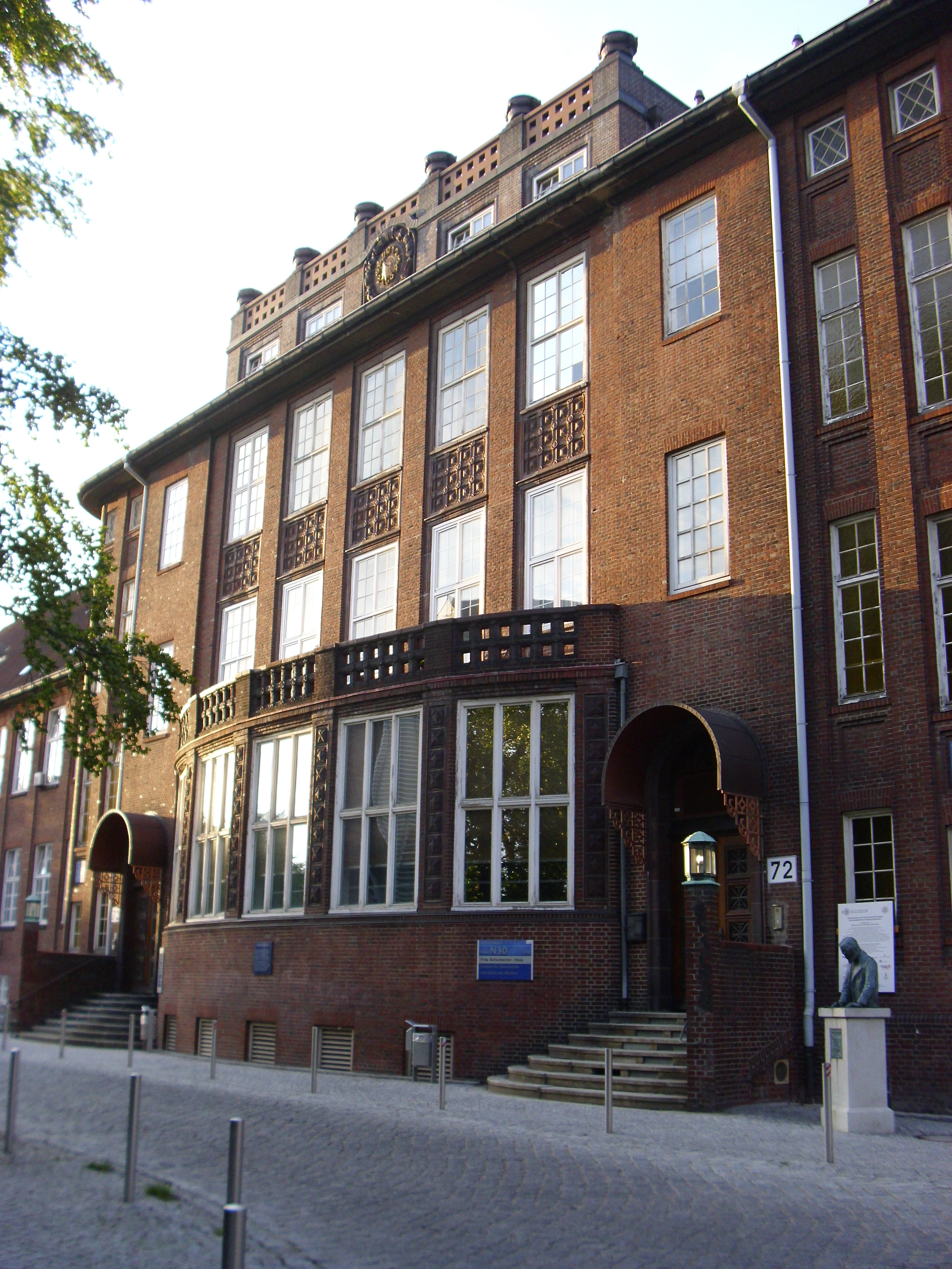 Universitätsklinikum Hamburg-Eppendorf, Martinistraße 52, Gebäude N 30 (vorher 72) - Fritz-Schumacher-Haus This is a photograph of an architectural monument.